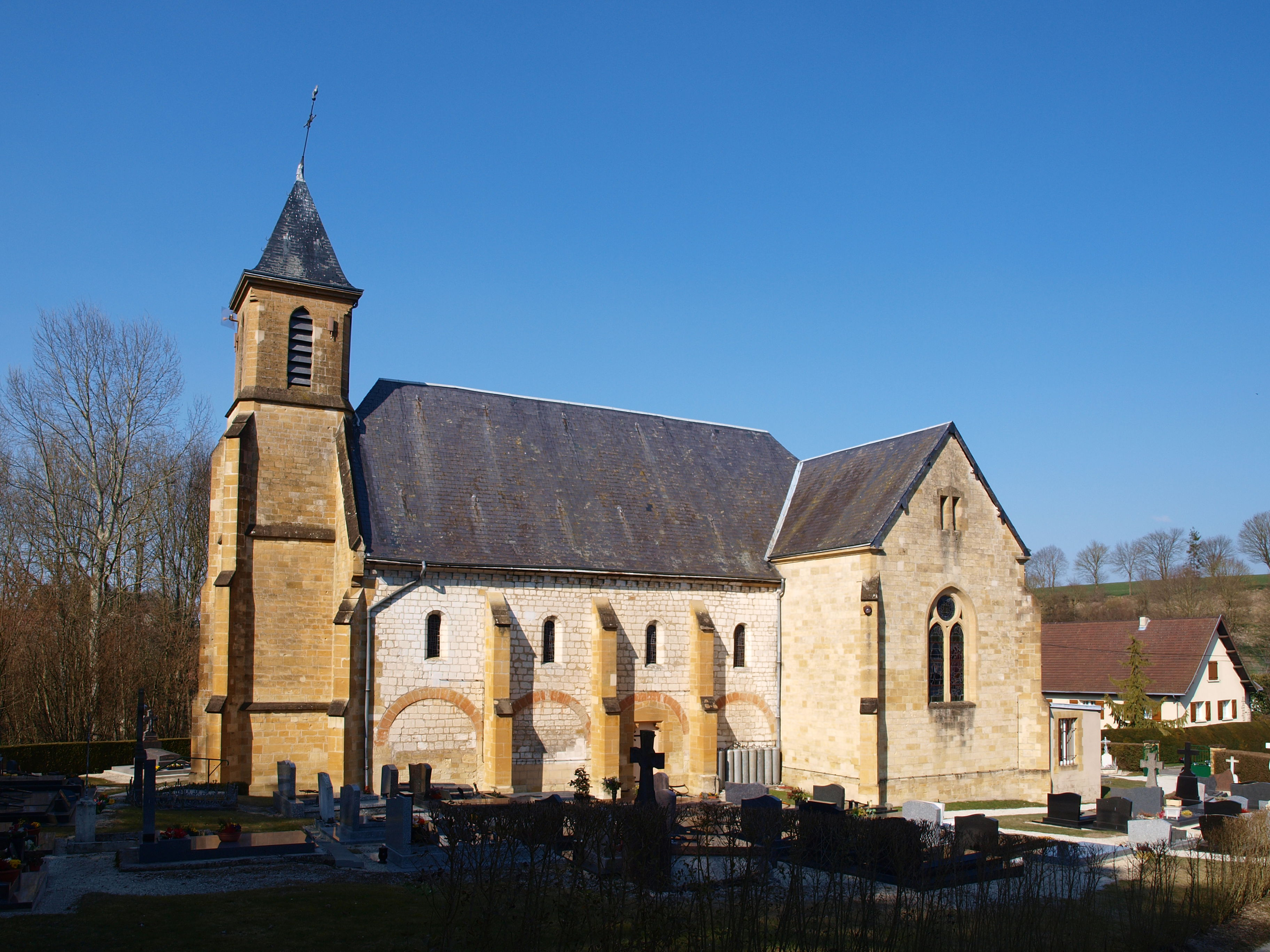 Église Saint-Pierre et Saint-Paul de Semide (Ardennes, France)